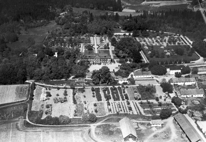 Ekebyhovs slott med trädgård, park och odlingar.